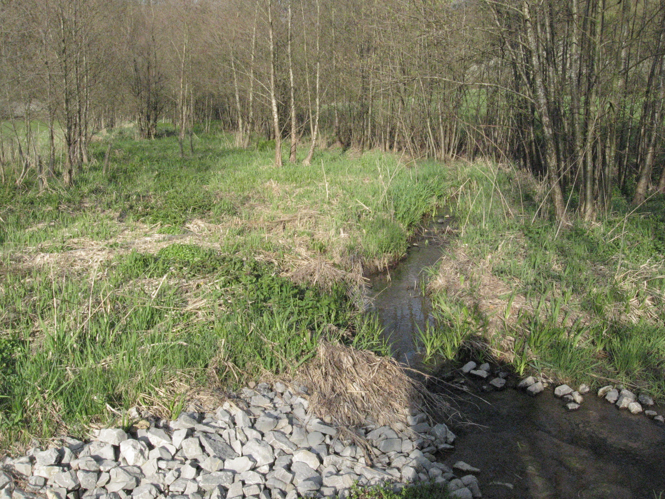 Blick talaufwärts von einer angelegten Furt auf den renaturierter Lauf des Schenkenbachs in seinem Wiesental unterhalb des vorderen Schenkensee und oberhalb der Mündung in den Nesselbach in der Mitte zwischen den Weilern Frankenhardt-Markertshofen und Frankenhardt-Hinteruhlberg. Nachdem der Bach in der ersten Hälfte des 20. Jahrhunderts begradigt worden war, legte man ihn um die Wende vom 20. ins 21. Jahrhunderts wieder in Schlingen und säumte ihn beidseits mit einer Gehölzreihe. Am Aufnahmeort wurde eine Überfahrt über ein gelegtes Rohr durch eine neu angelegte Furt ersetzt, die mit Muschelkalkblöcken ausgelegt wurde. Der Schotter links unten aus Blaukalk, der im Einzugsgebiet nicht vorkommt, wurde ebenfalls eingebracht. Im Bachbett liegen etliche Bänke mit einer Fraktion von sehr großem und sehr gerundetem Kies, die wohl ebenfalls eingebracht wurde.